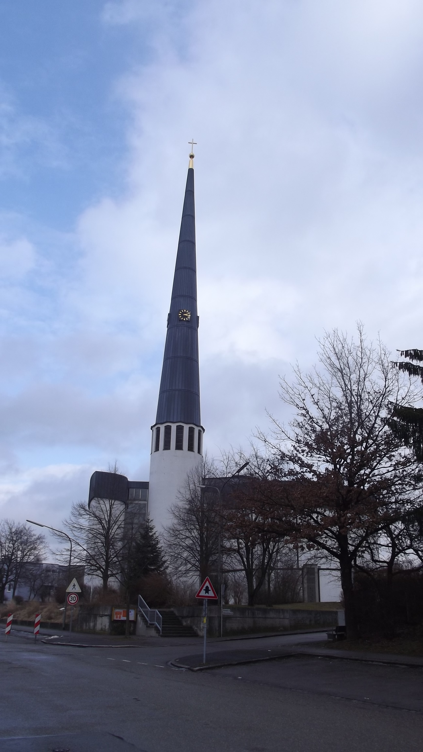 Herz-Maria church Diedorf